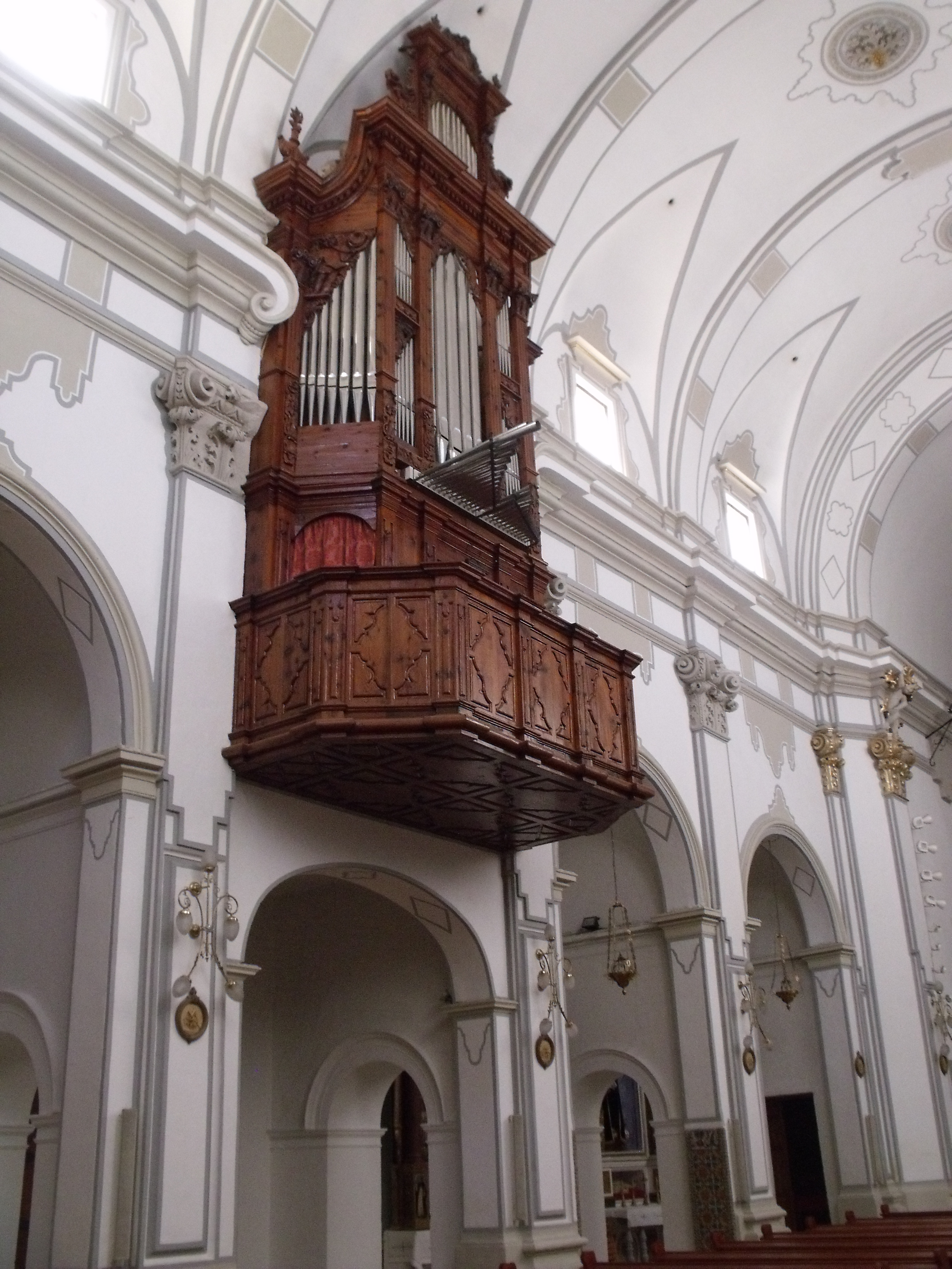 Orge. Església de l'Assumpció. Montesa, La Costera.